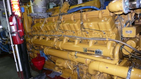 USCGC Eagle's massive Caterpillar D399 diesel engine